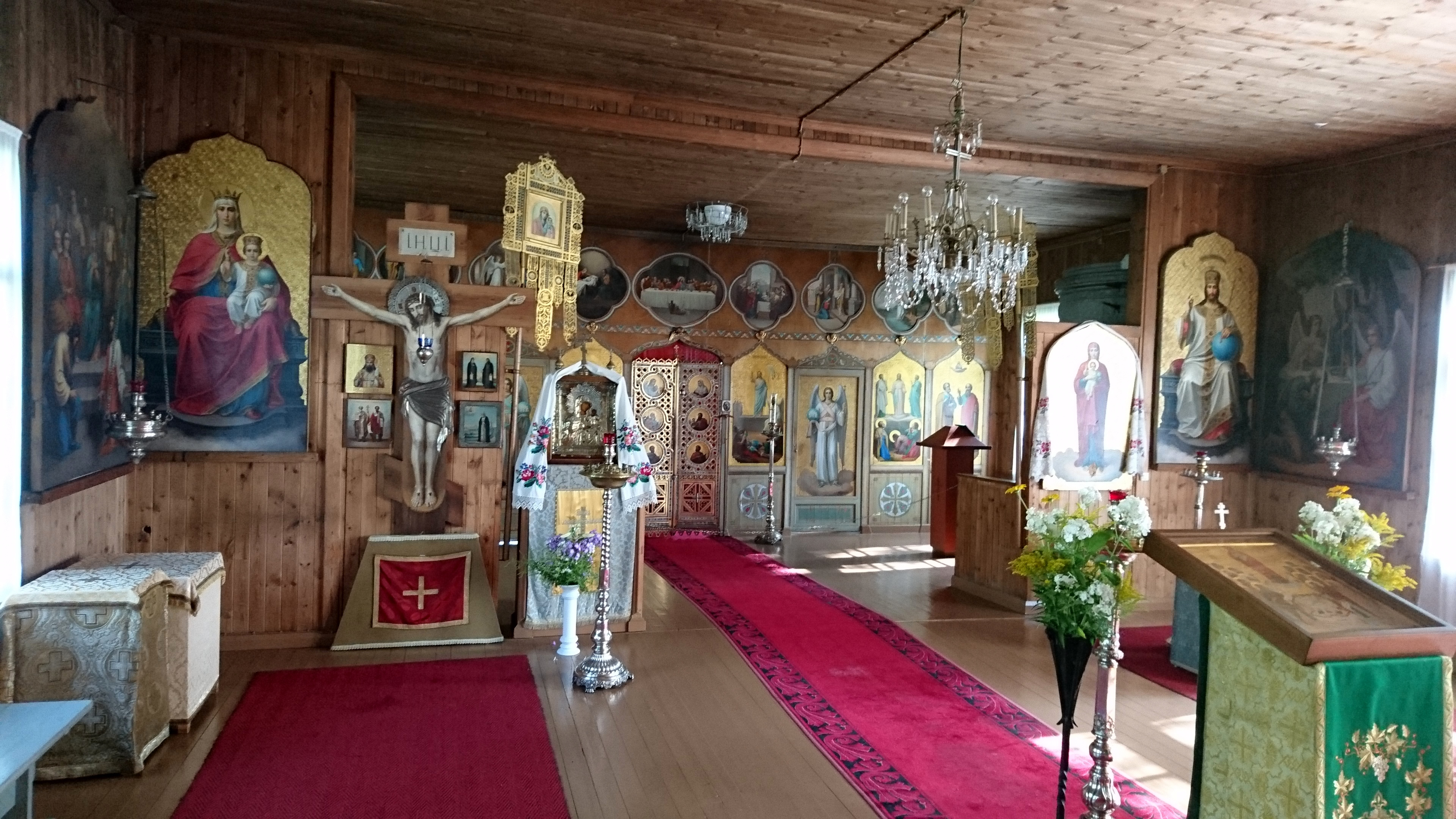 Valamon luostarin vanha kirkko 2018.